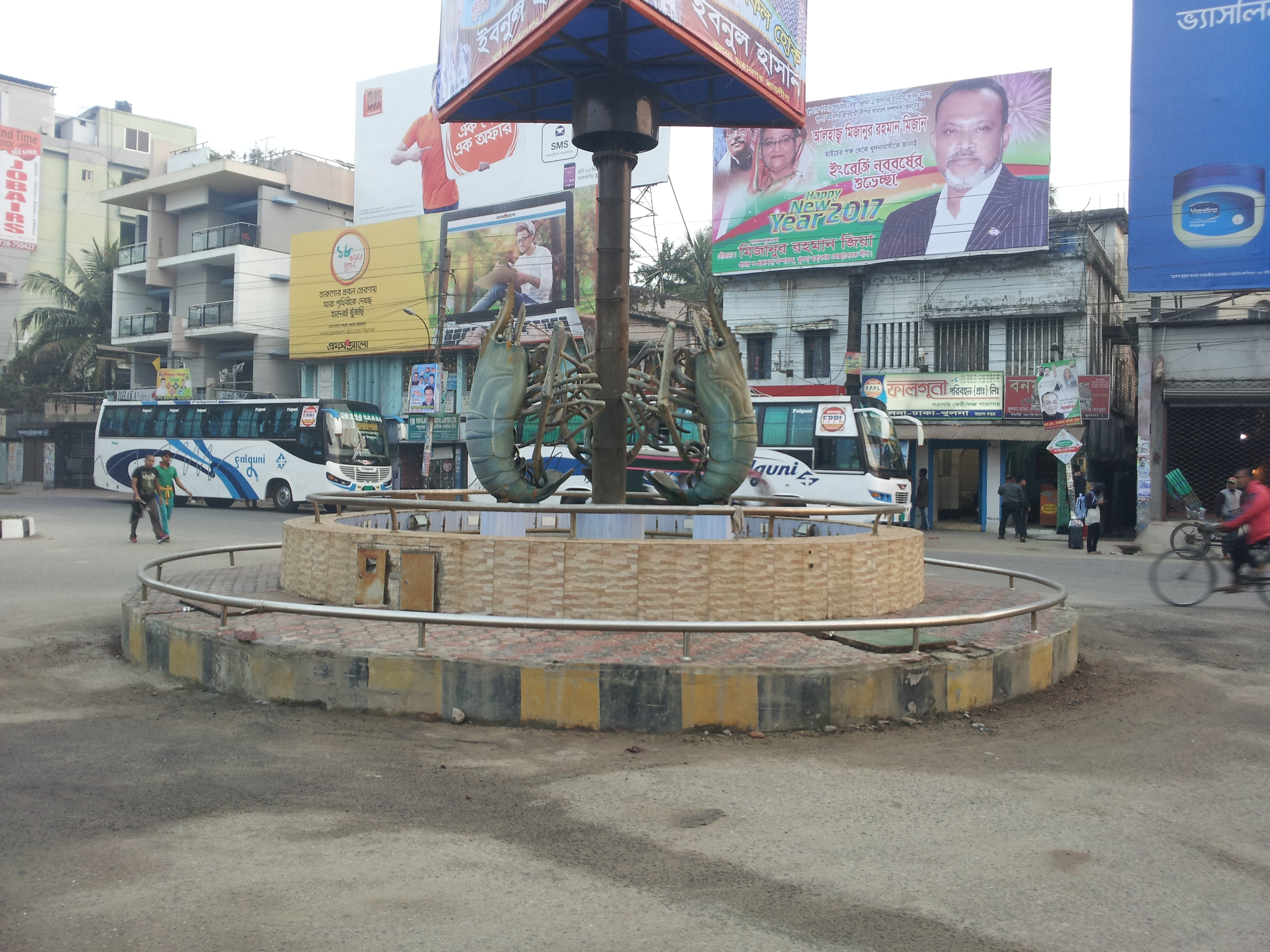 রয়েলের মোড়, শিববাড়ি, খুলনা